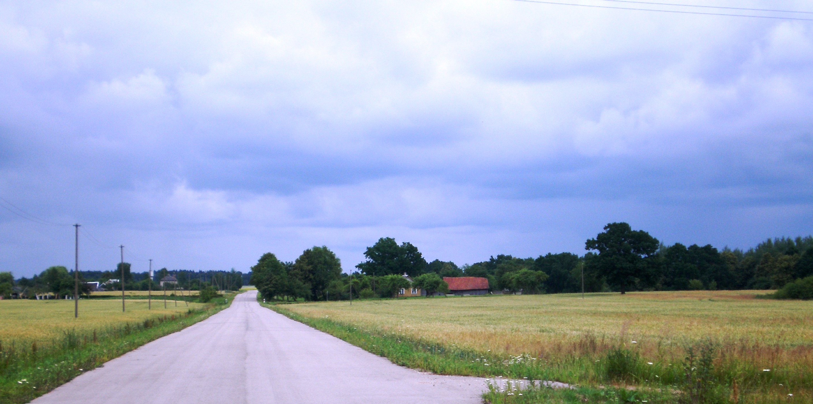 Gaižuvėlė, Kauno raj.